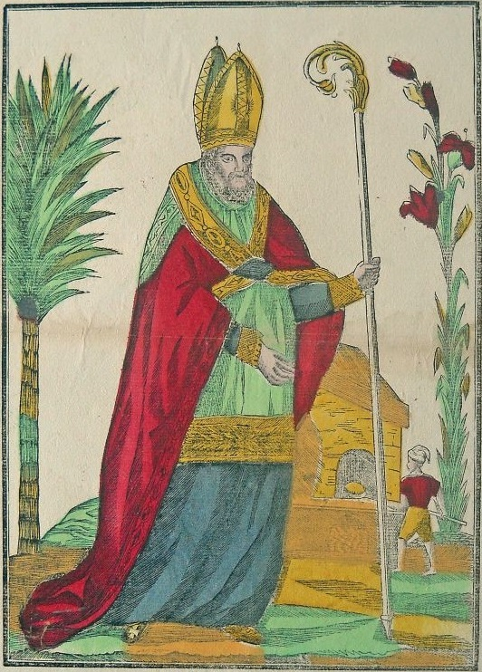 "Saint Honoré, évêque, patron des boulangers", chez Deckherr, imprimeur, à Montbéliard.